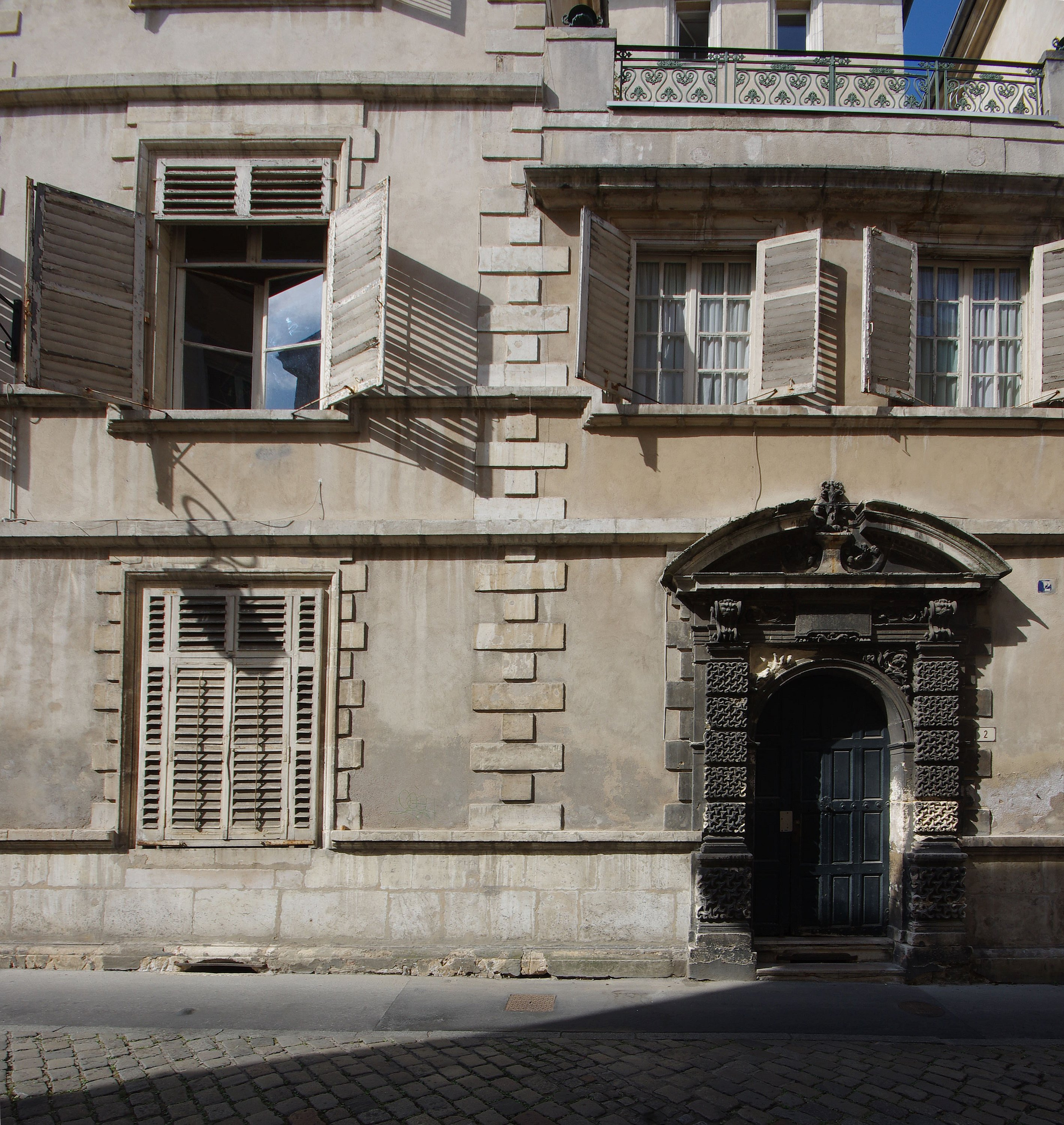 Hôtel de Martignyporte, élévation, toiture, vantail, 2 rue de Guise (Inscrit, 1944) .